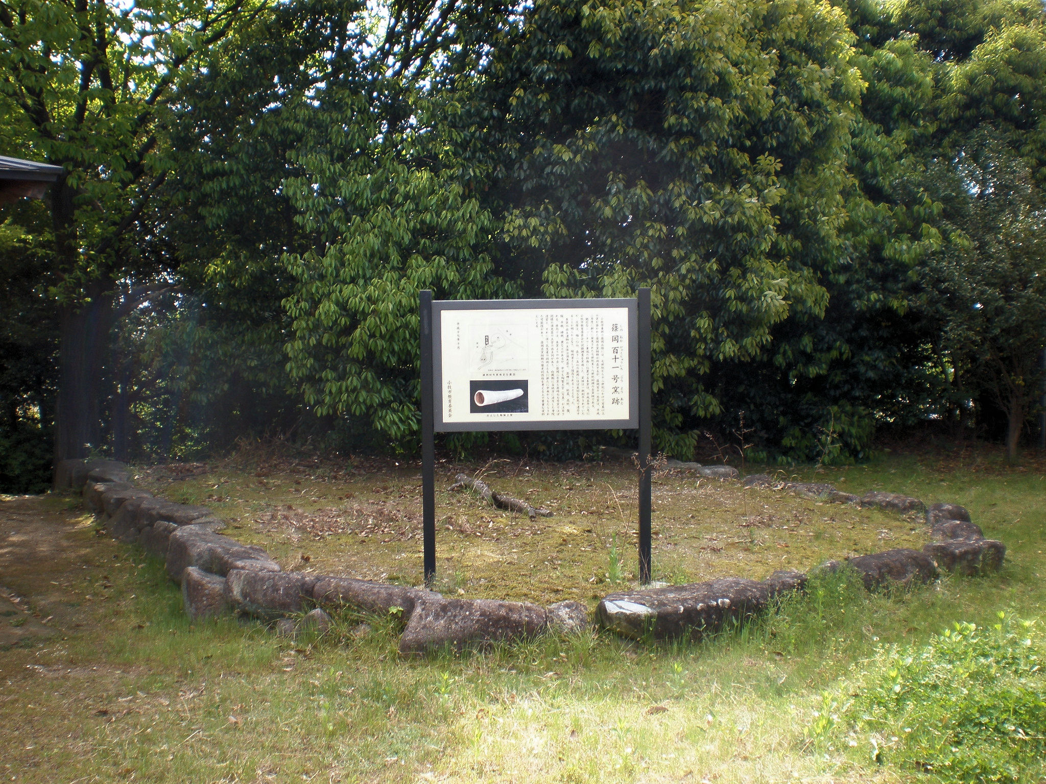 愛知県小牧市にある篠岡古窯跡群の窯跡の内の1基である篠岡111号窯跡